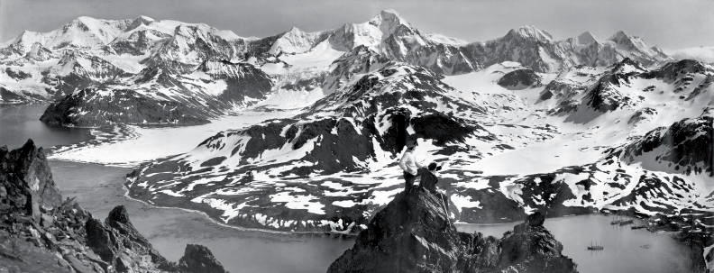 Panorama de la Géorgie du sud